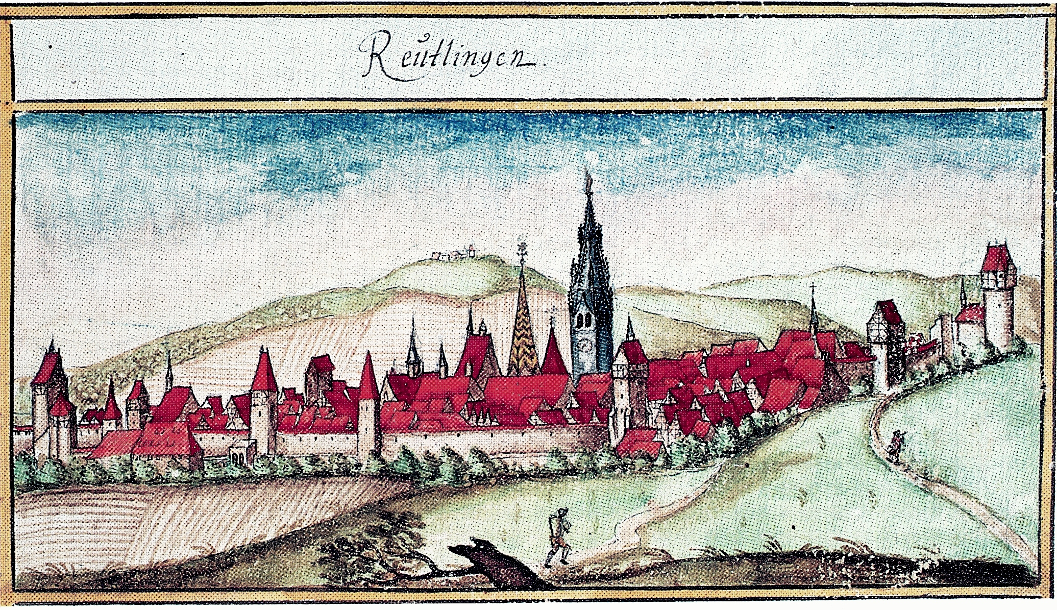 Reutlingen